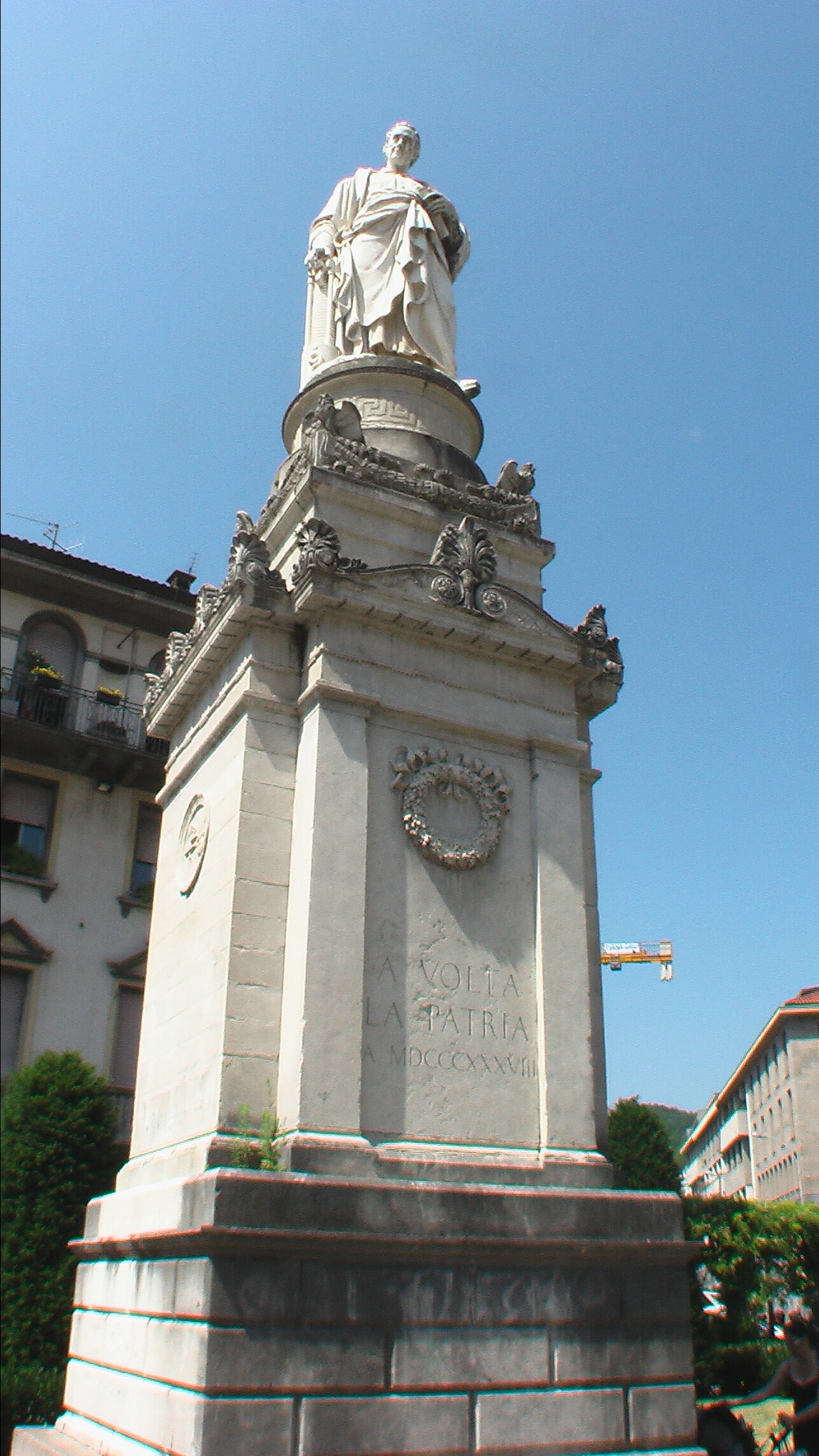 AllesandroVoltaComo